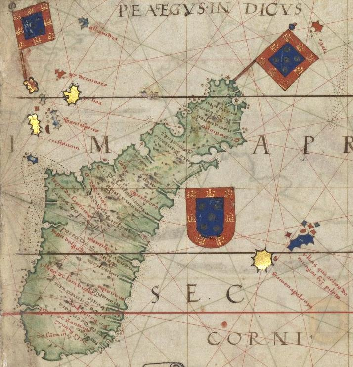 Isla de Madagascar (llamada en latín "insule divi laurentii", que significa "isla de San Lorenzo") en uno de los mapas regionales del Atlas Miller.